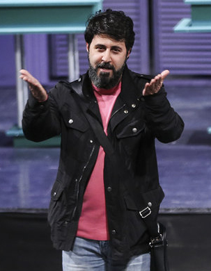 هومن حاجی عبداللهی اختتامیه سی و هفتمین جشنواره تئاتر فجر - ۴ اسفند ۱۳۹۷ - تالار وحدت تهران